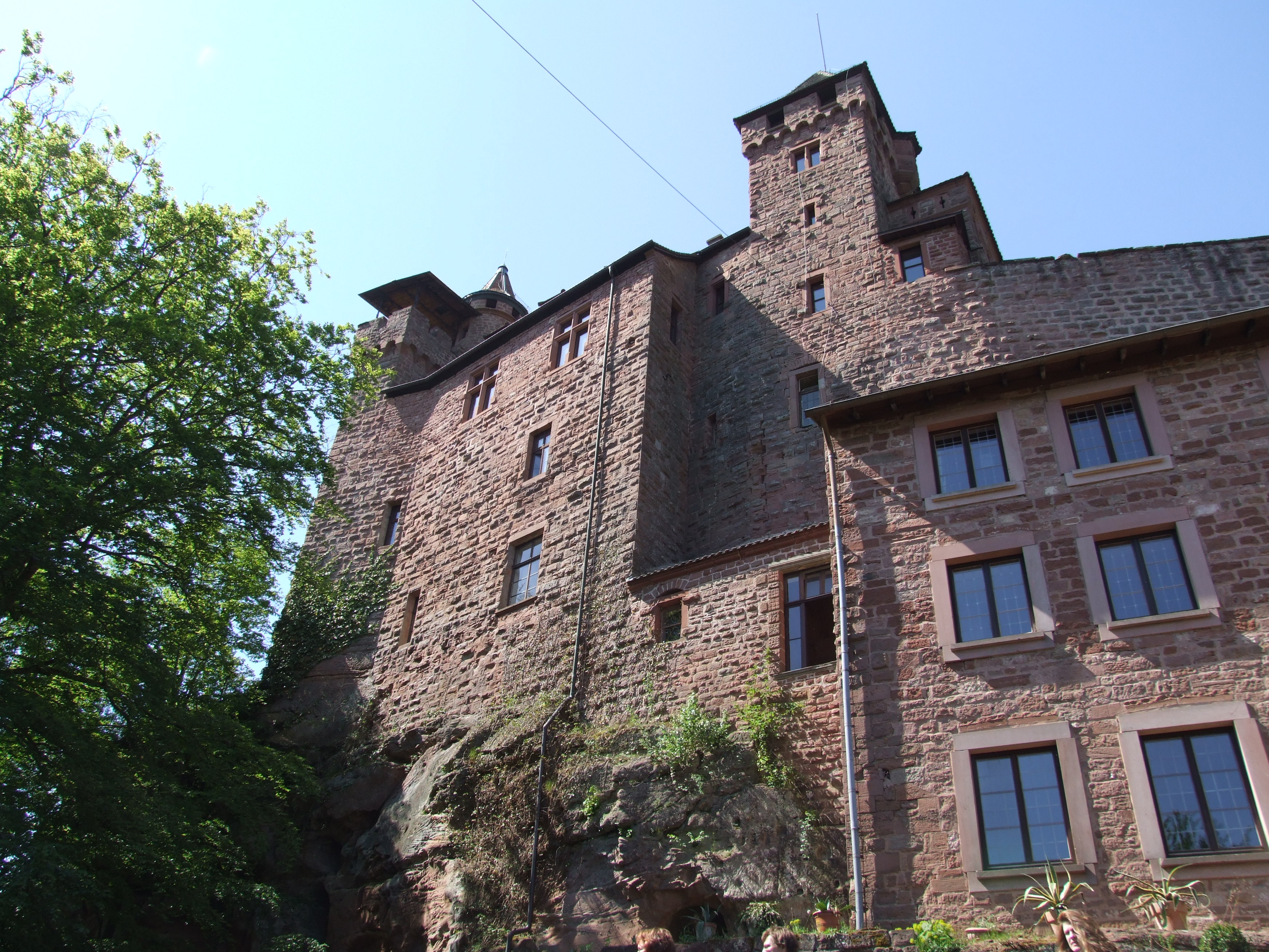 Hauptgebäude der Burg Berwartstein